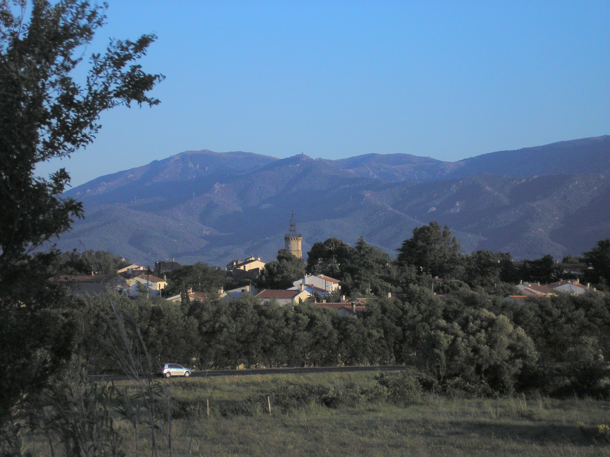 Latour-Bas-Elne et les Albères